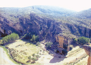 Hoz del río Gritos